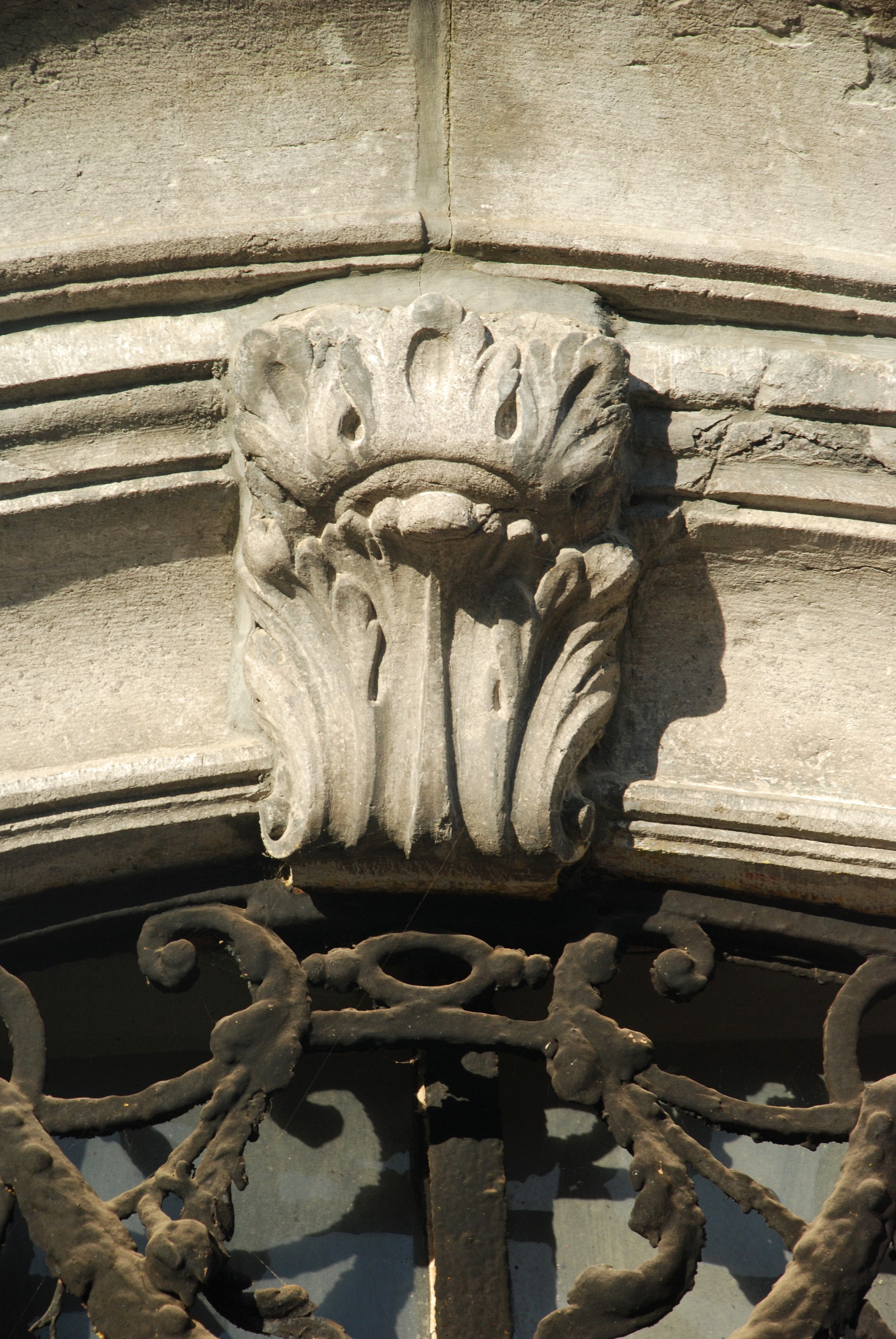 Belgique - Wallonie - Chapelle Notre-Dame des Affligés de Ways